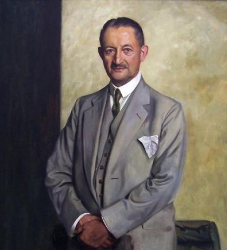 Eugen Urban: Porträt Max Richard Krüger, Inhaber der Firma Krügerol, 1928